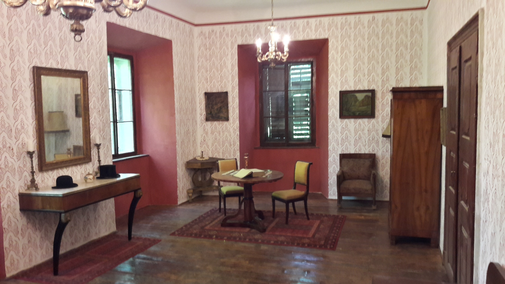 Notranjost